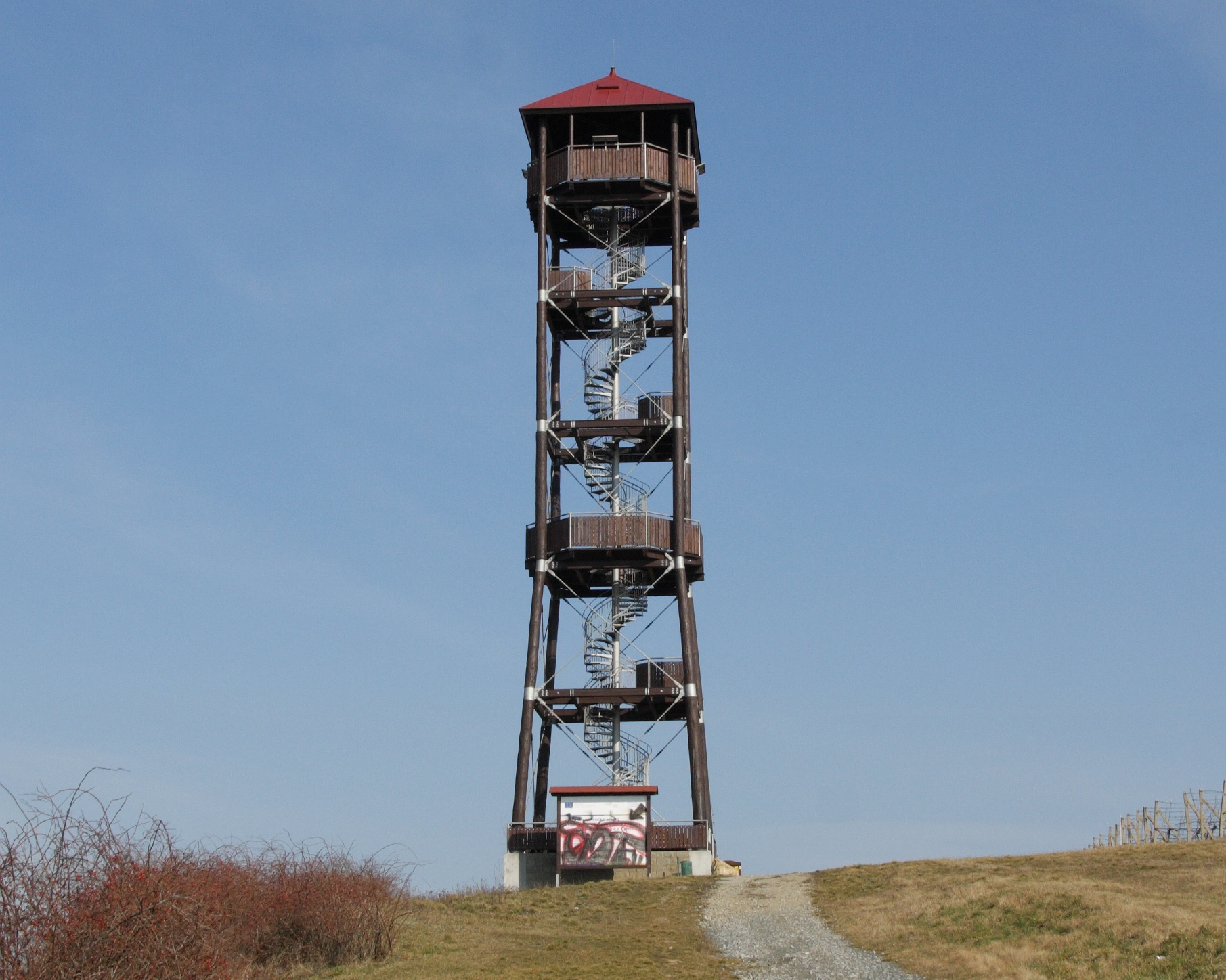 Přítluky - rozhledna Maják.